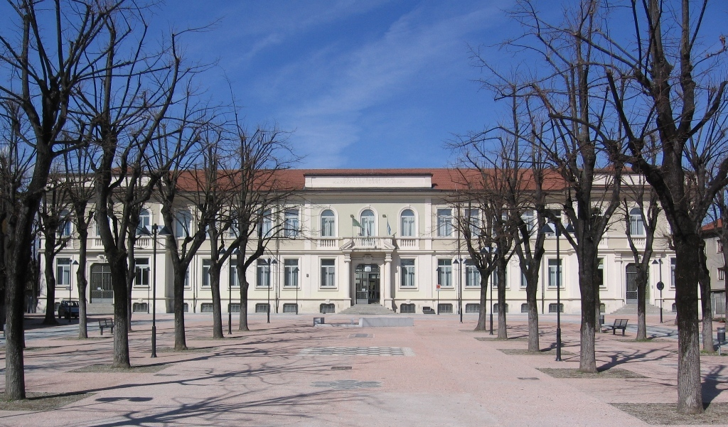 Scuole Cadorna, Seregno